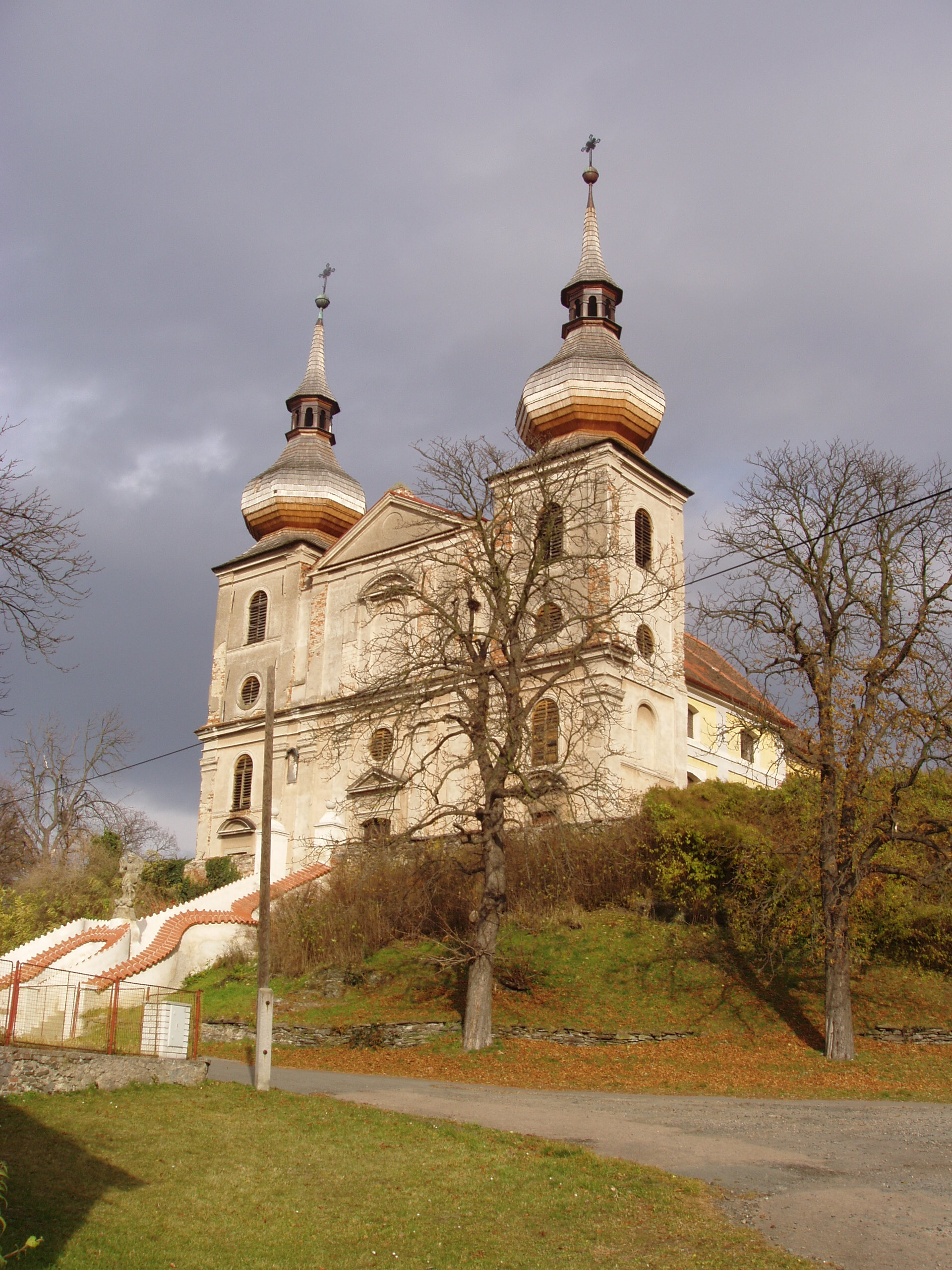 Kostel Nejsvětější Trojice (Zbyslav), Zbyslav